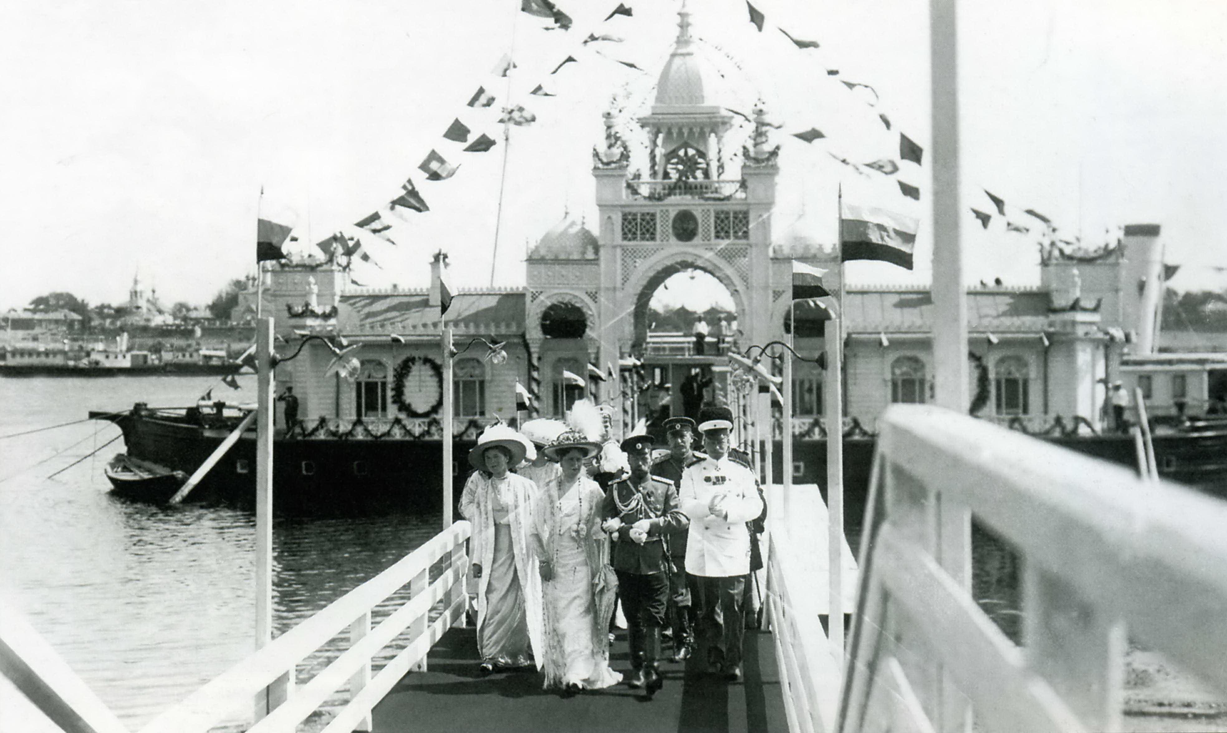 Торжества 300-летия дома Романовых в Ярослале. Встреча городской делегацией с хлебом-солью.